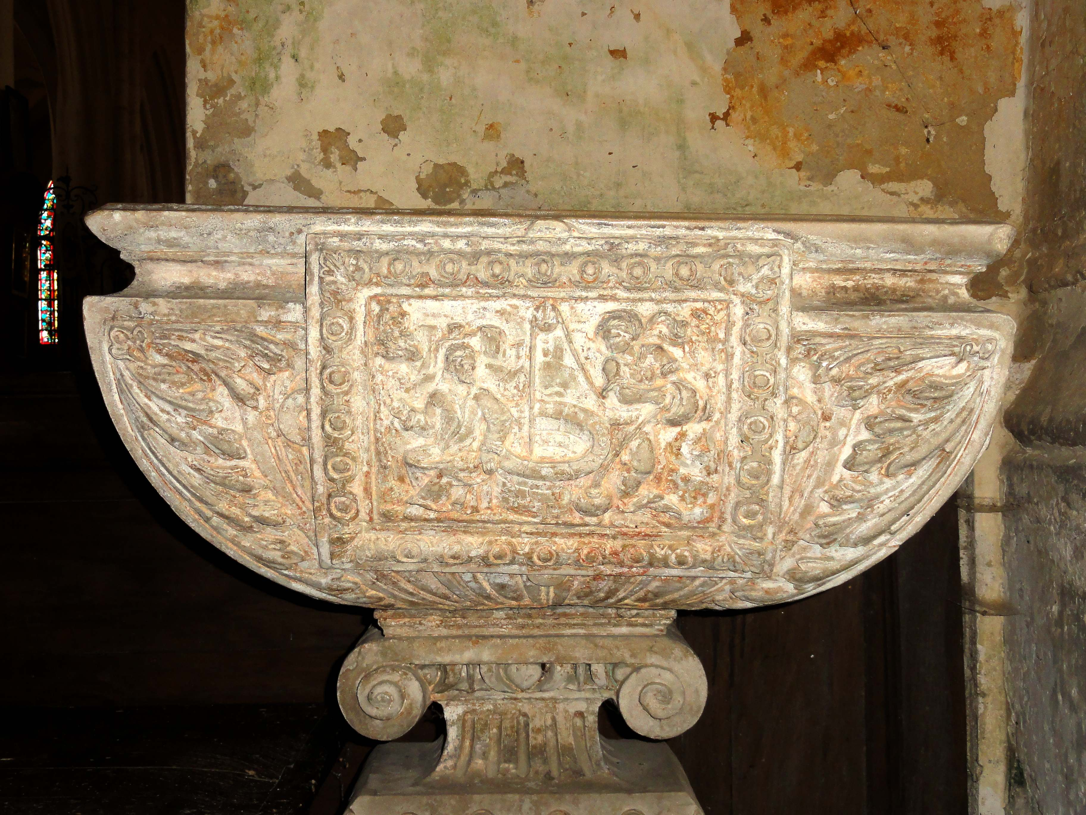 Mobilier de l'église (voir titre).